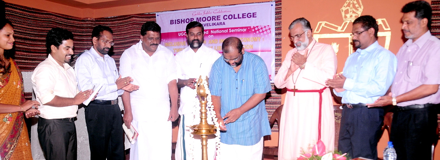 c p john inaugurates the seminar